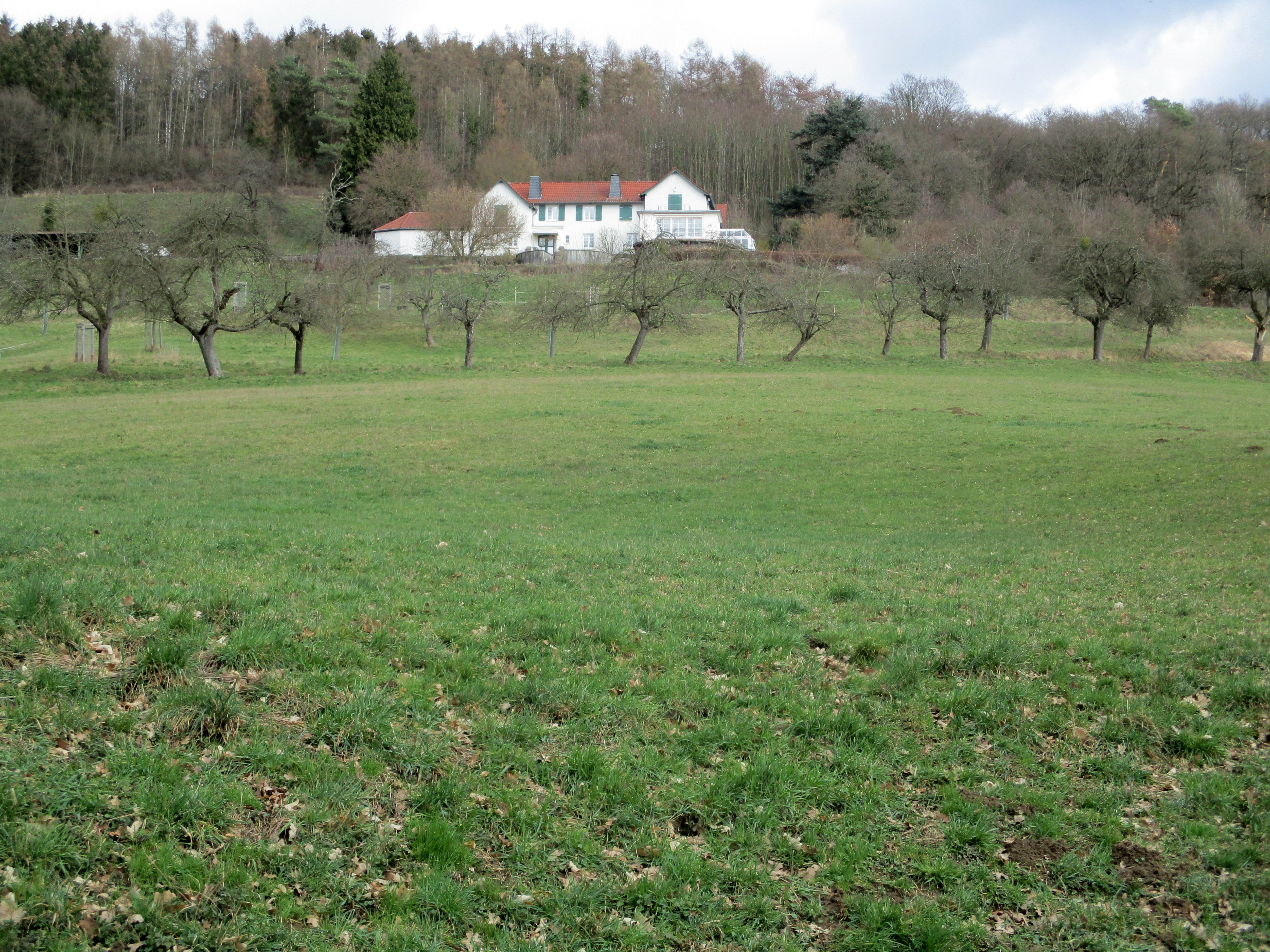 Steinsbüscher Hof, Bad Honnef: Ansicht vom Mucherwiesenweg